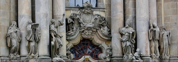 Bazylika w Krzeszowie